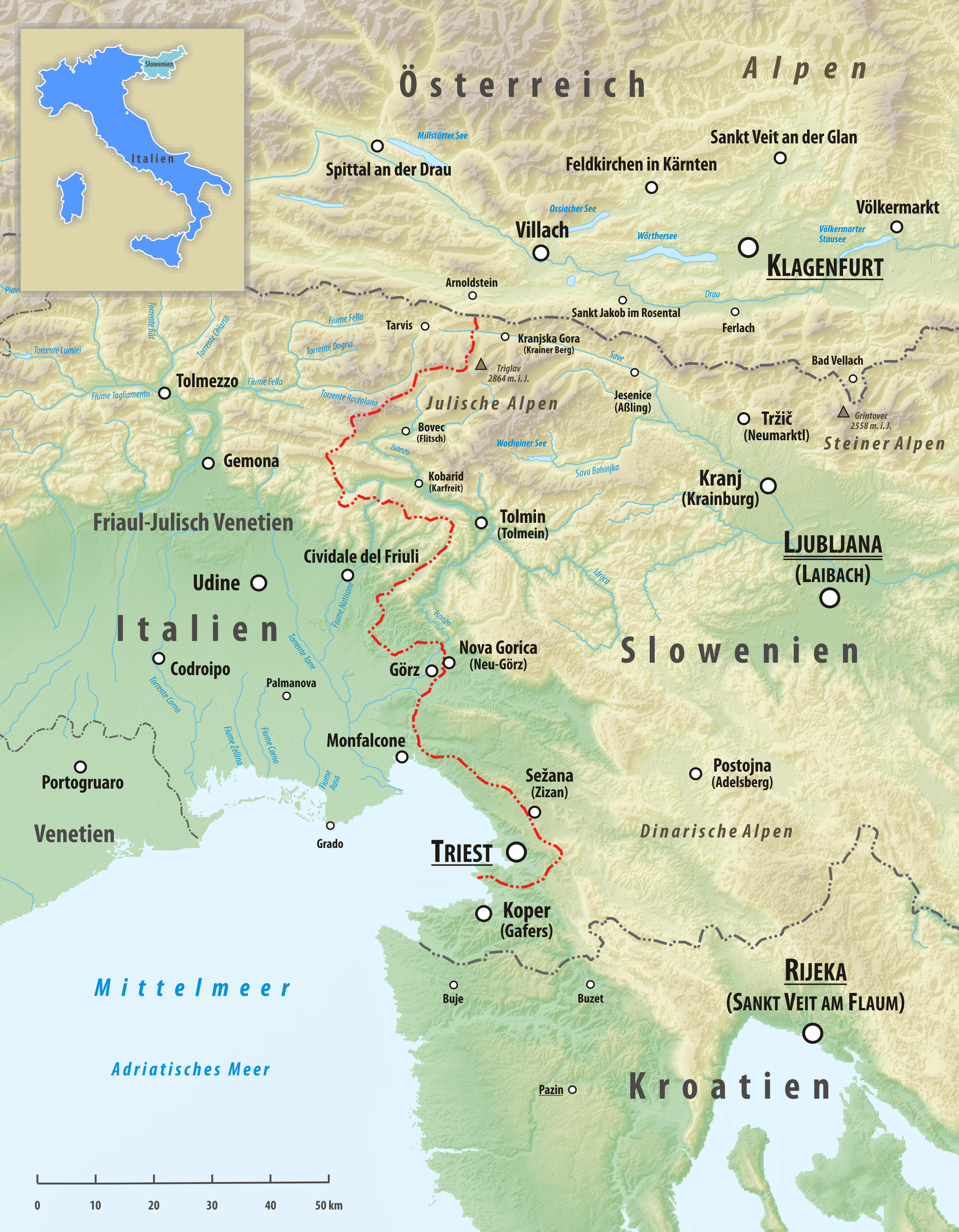 Reliefkarte des Grenzverlaufes zwischen Italien und Slowenien Topographischer Hintergrund: NASA Shuttle Radar Topography Mission (public domain). SRTM3 v.2.